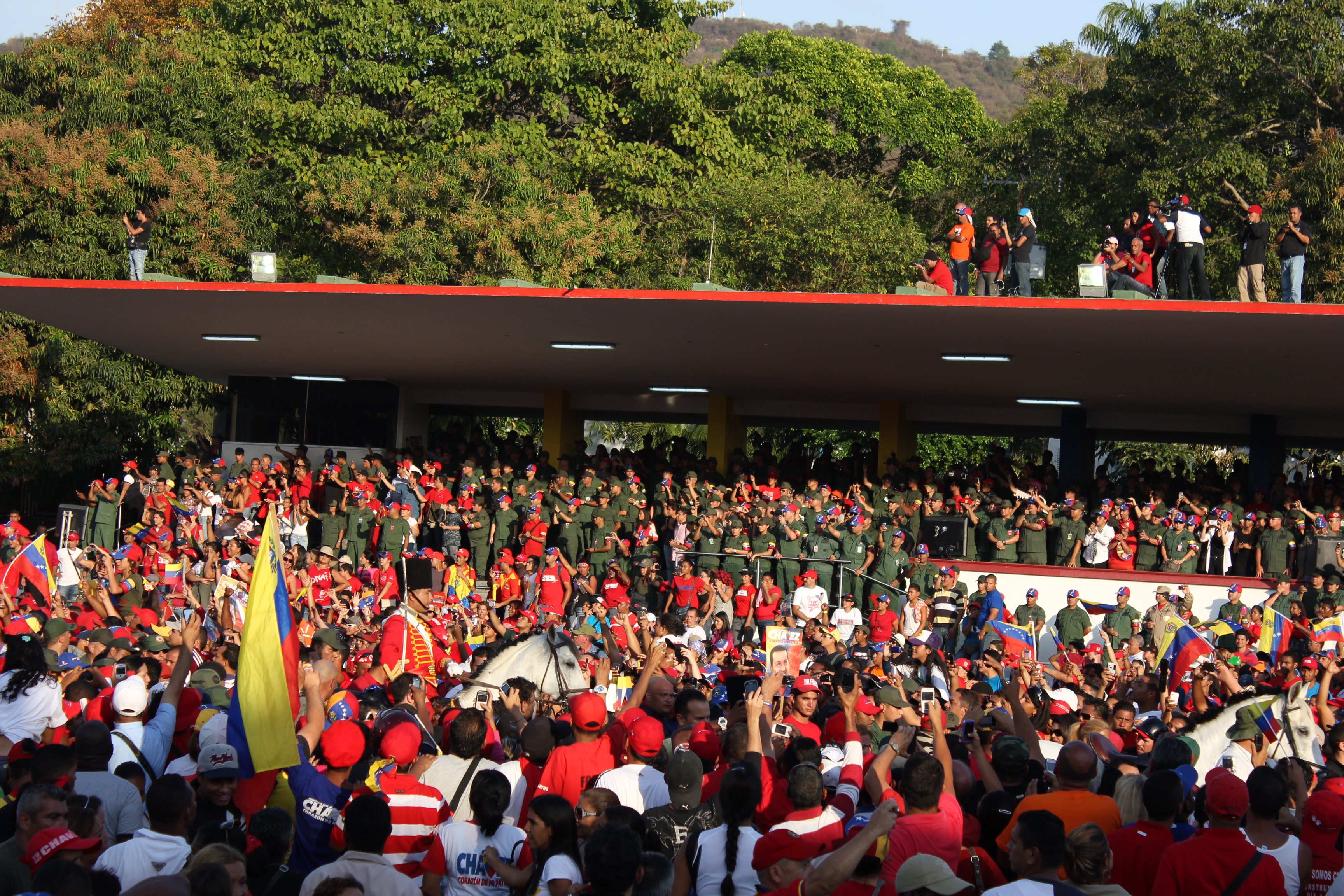 Paseolo los Próceres, cortejo fúnebre de Hugo Chavez.